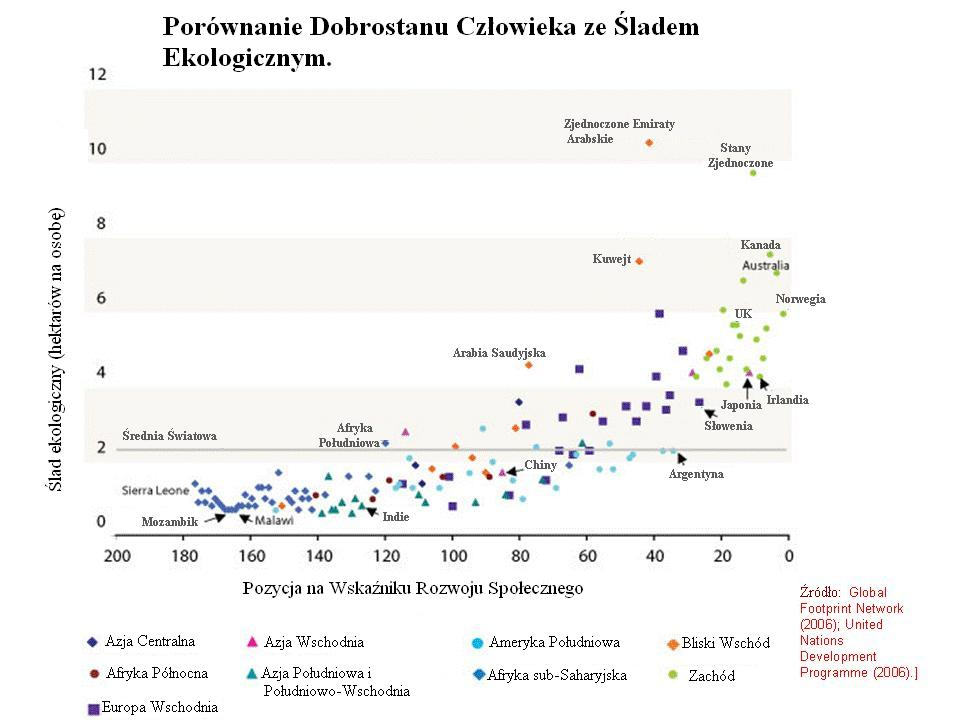 Porównanie śladu ekologicznego z pozycją na Wskaźniku Rozwoju (2006r.)